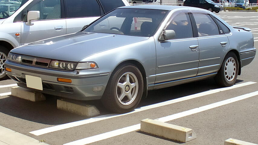 初代日産・セフィーロ